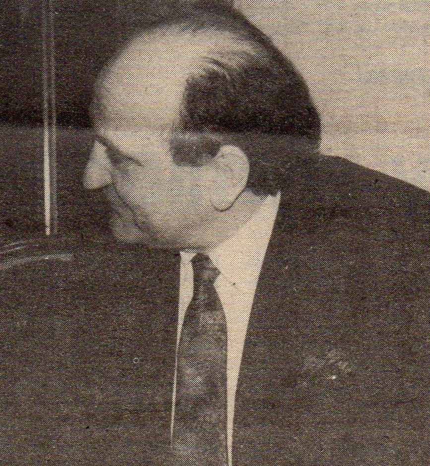 Gerry Collins w rozmowie z Tadeuszem Mazowieckim, 1990r.